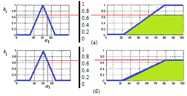 Приклад активізації висновка для правила нечіткої продукції